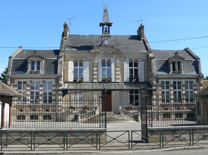 Hôtel de ville de Les Sièges (Yonne) en 2010.